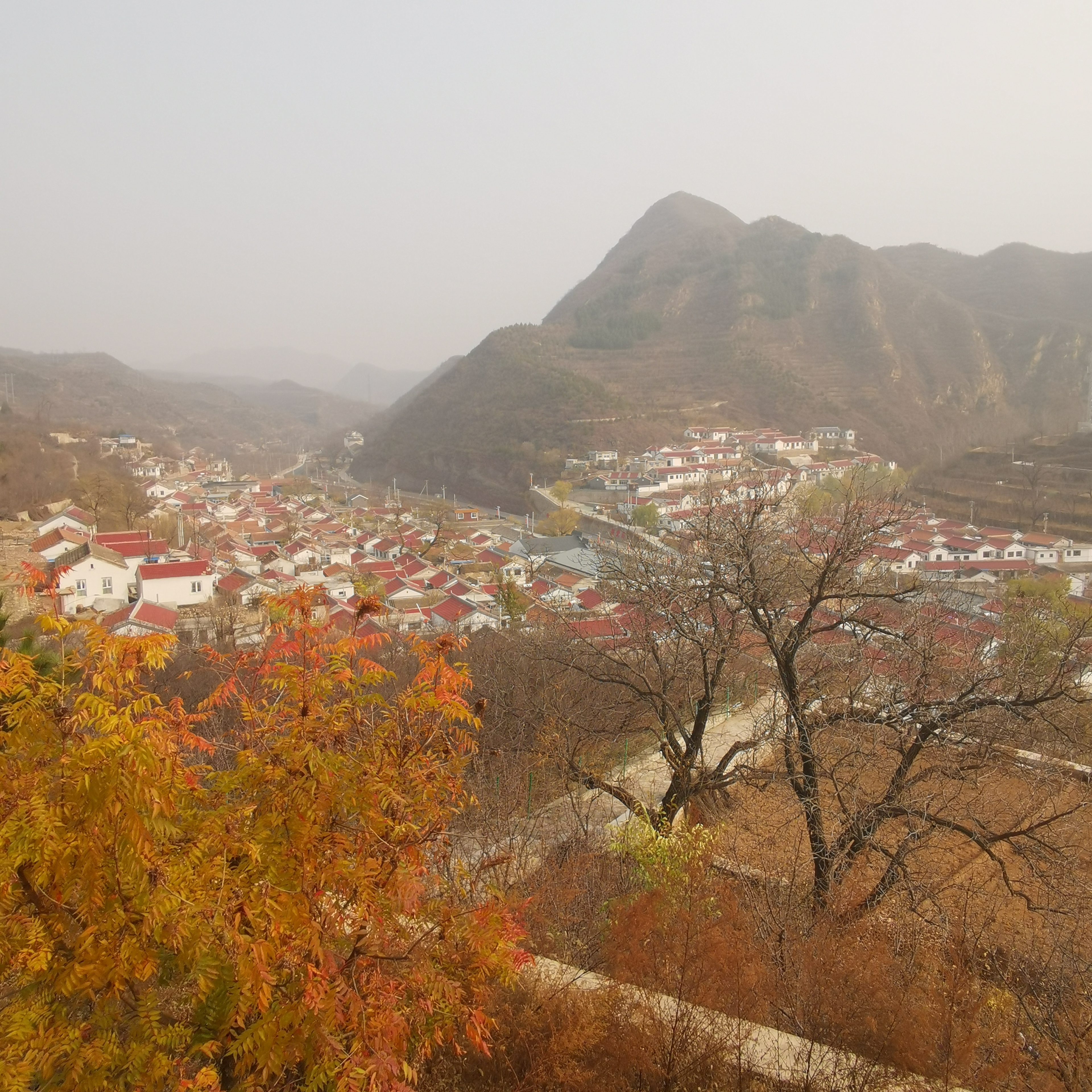 中文（中国大陆）: 雁翅镇田庄村